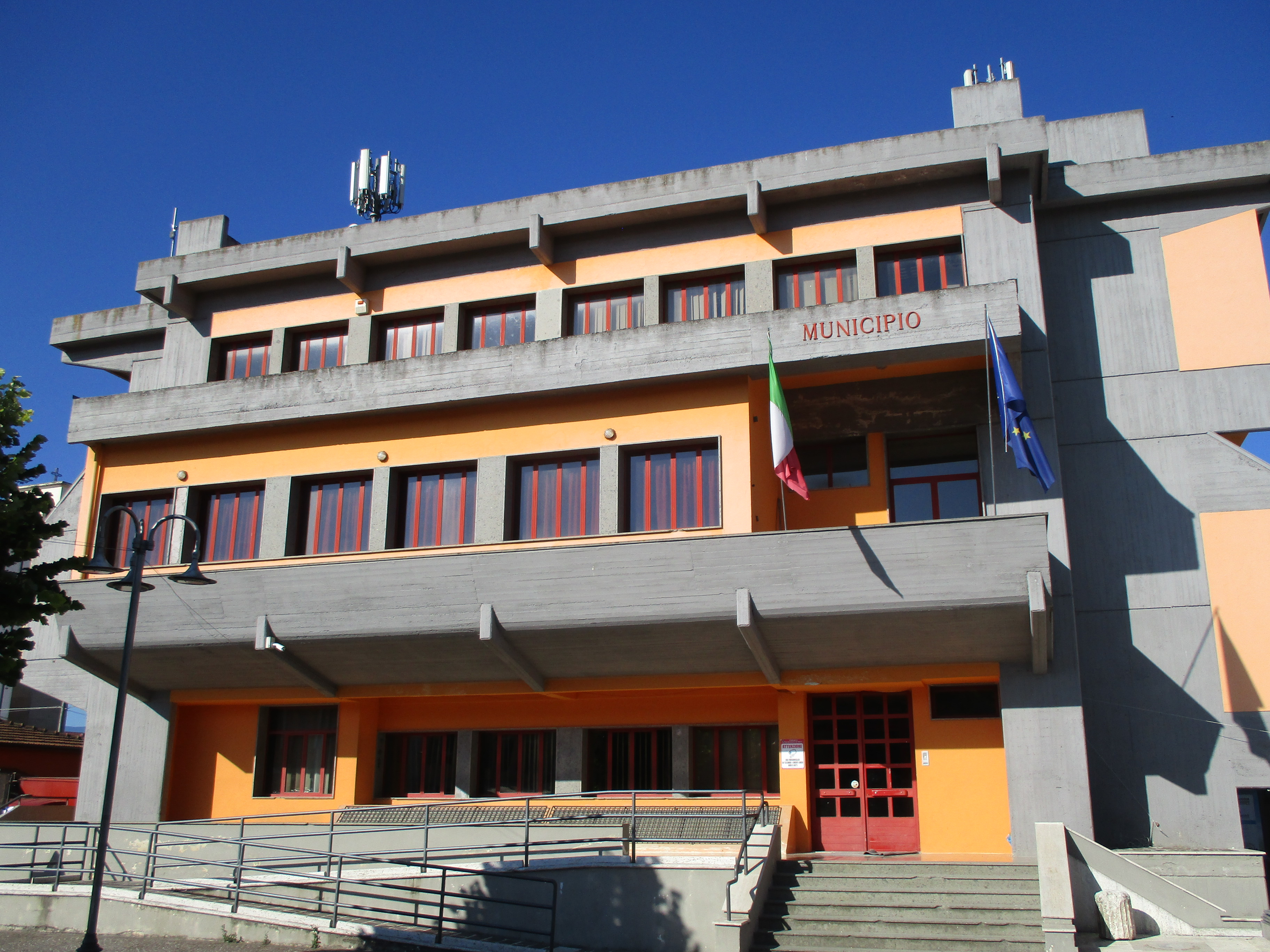 Il nuovo palazzo municipale